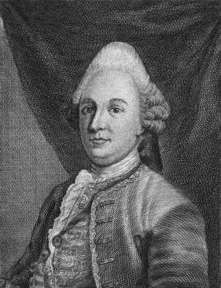 Johann Friedrich Struensee